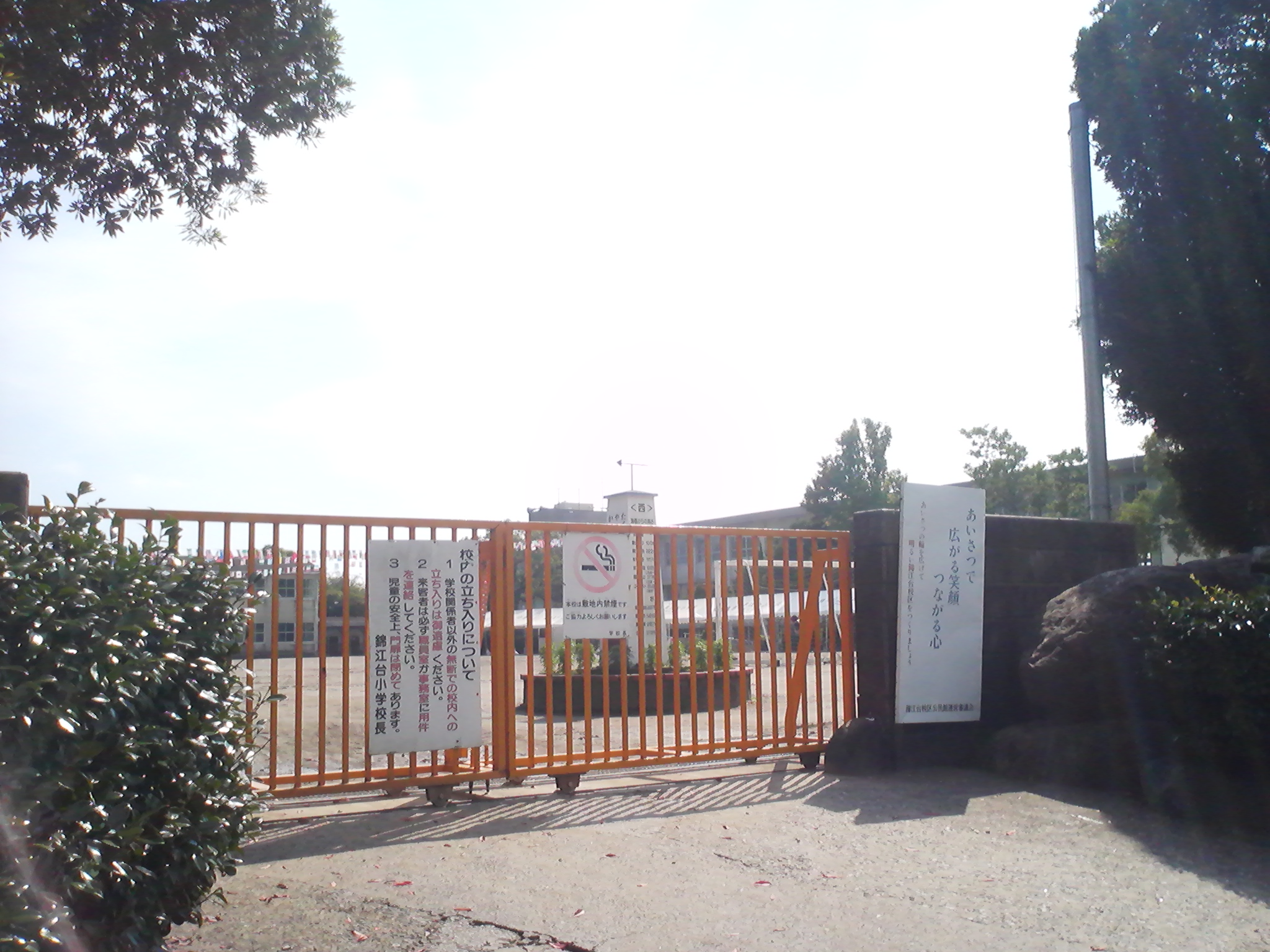 鹿児島市立錦江台小学校